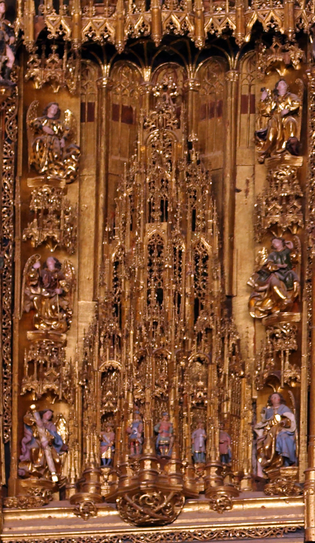 Tabernáculo de madera dorada, correspondiente al retablo mayor de la Catedral de Toledo (España)